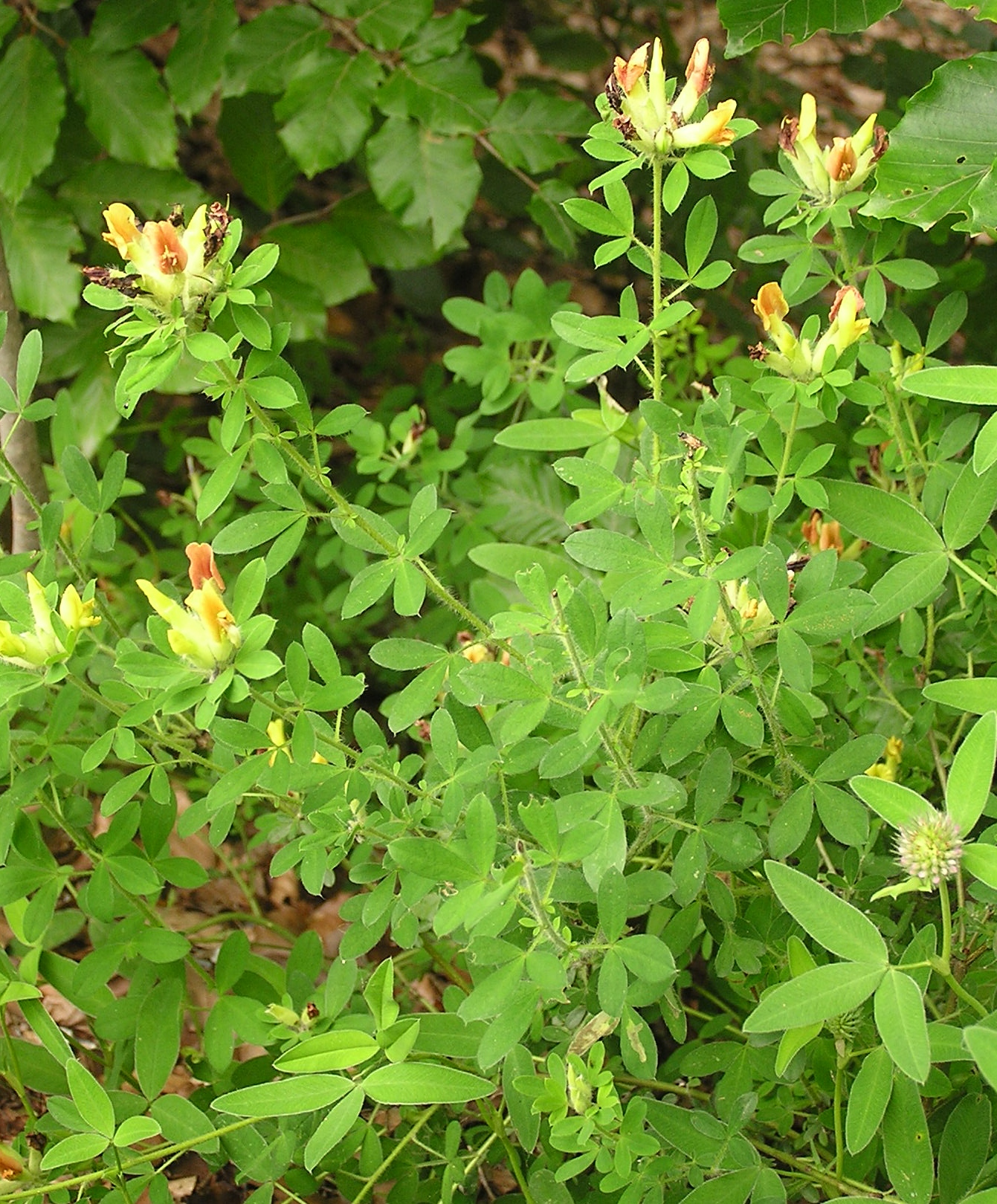 Chamaecytisus supinus an einem Straßenrand in der Nähe von Faßlberg bei Graz (Österreich).